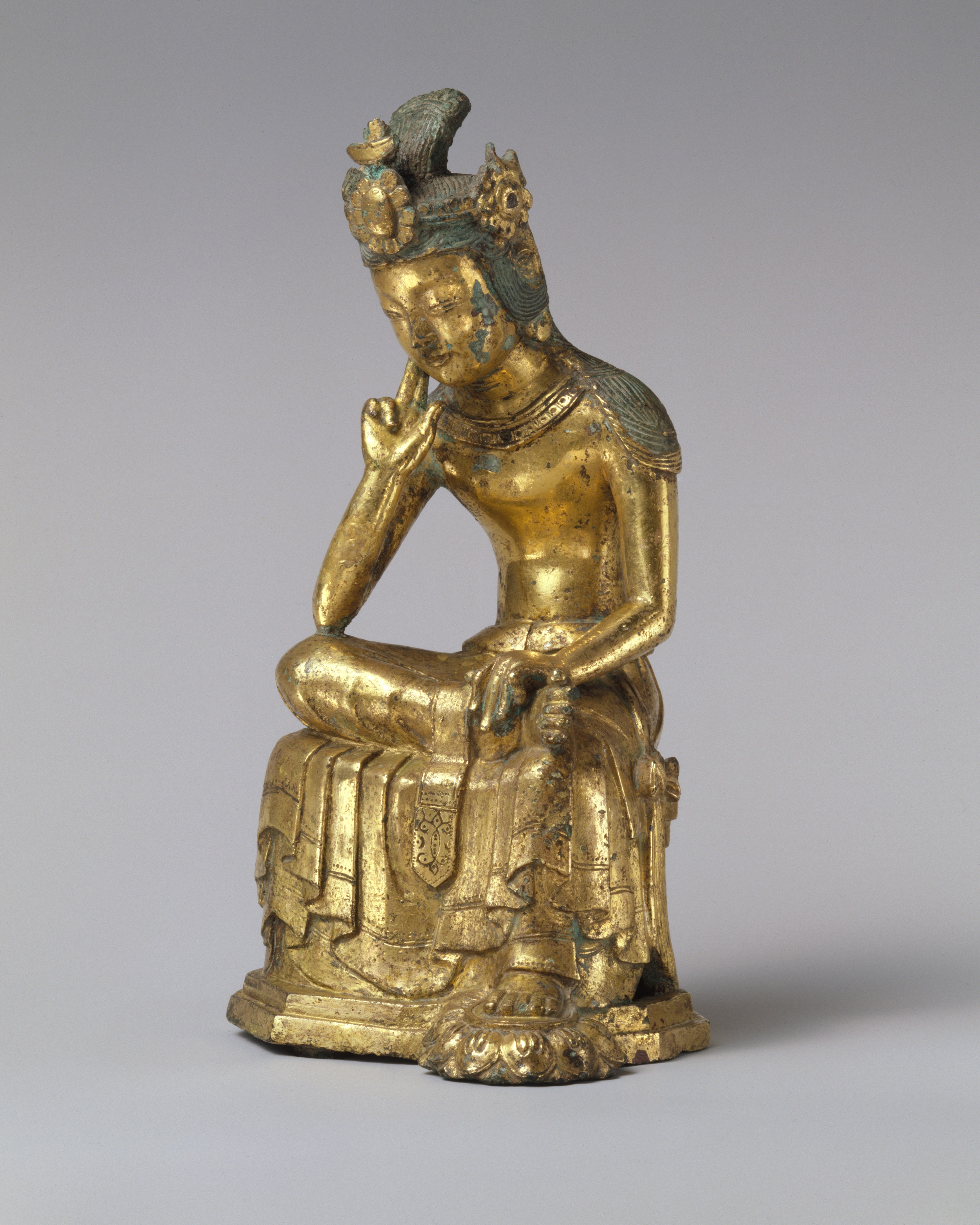 Korea; Figure; Sculpture